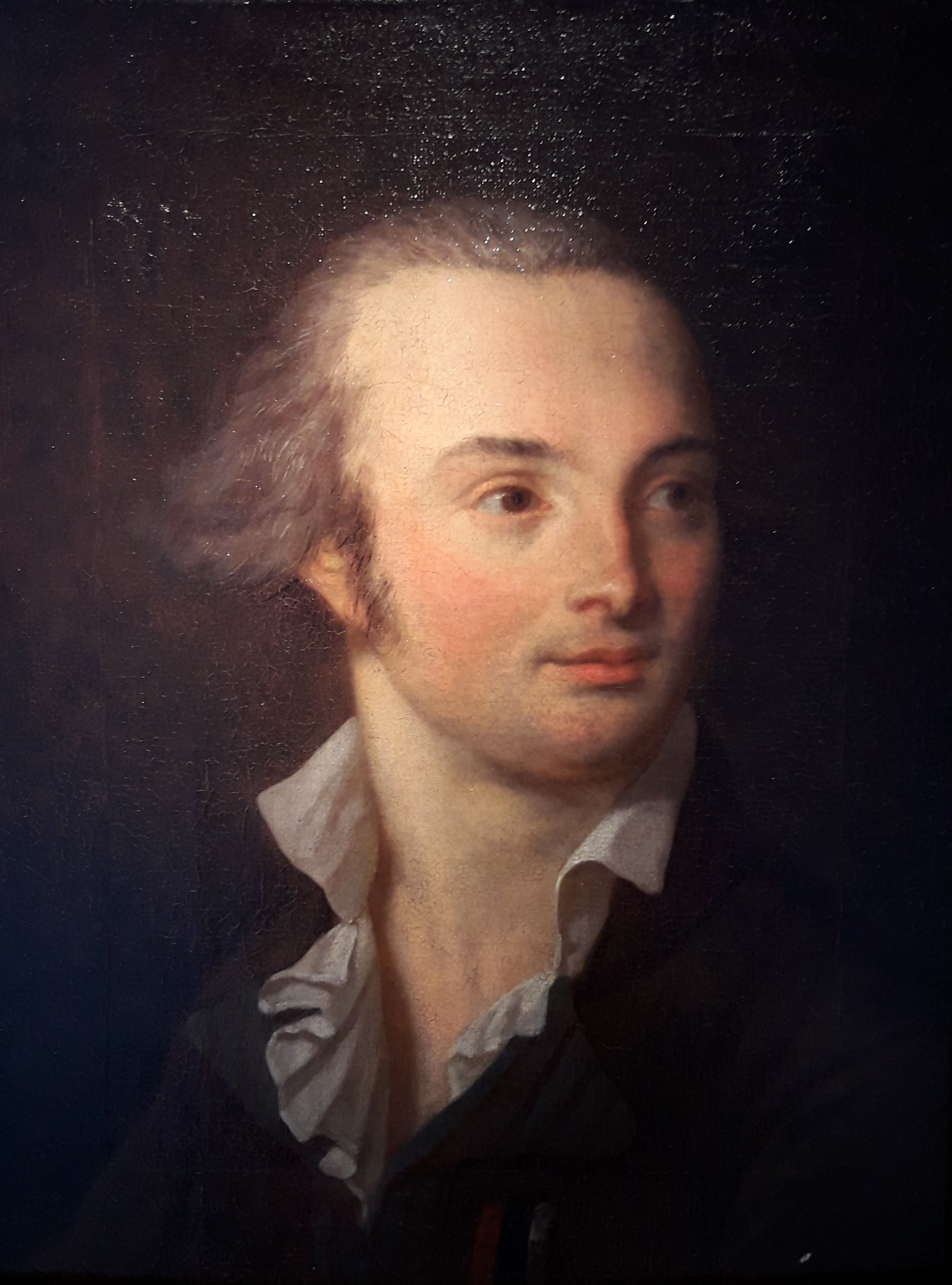 Portrait du sculpteur Gaulle par François Devosge. Huile sur toile. Musée d'art et d'histoire de Langres, inv. 843-2.